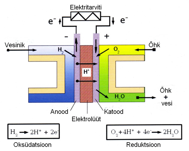 Polümeerelektrolüüdiga kütuseelemendi ehituse ja talitluse skeem